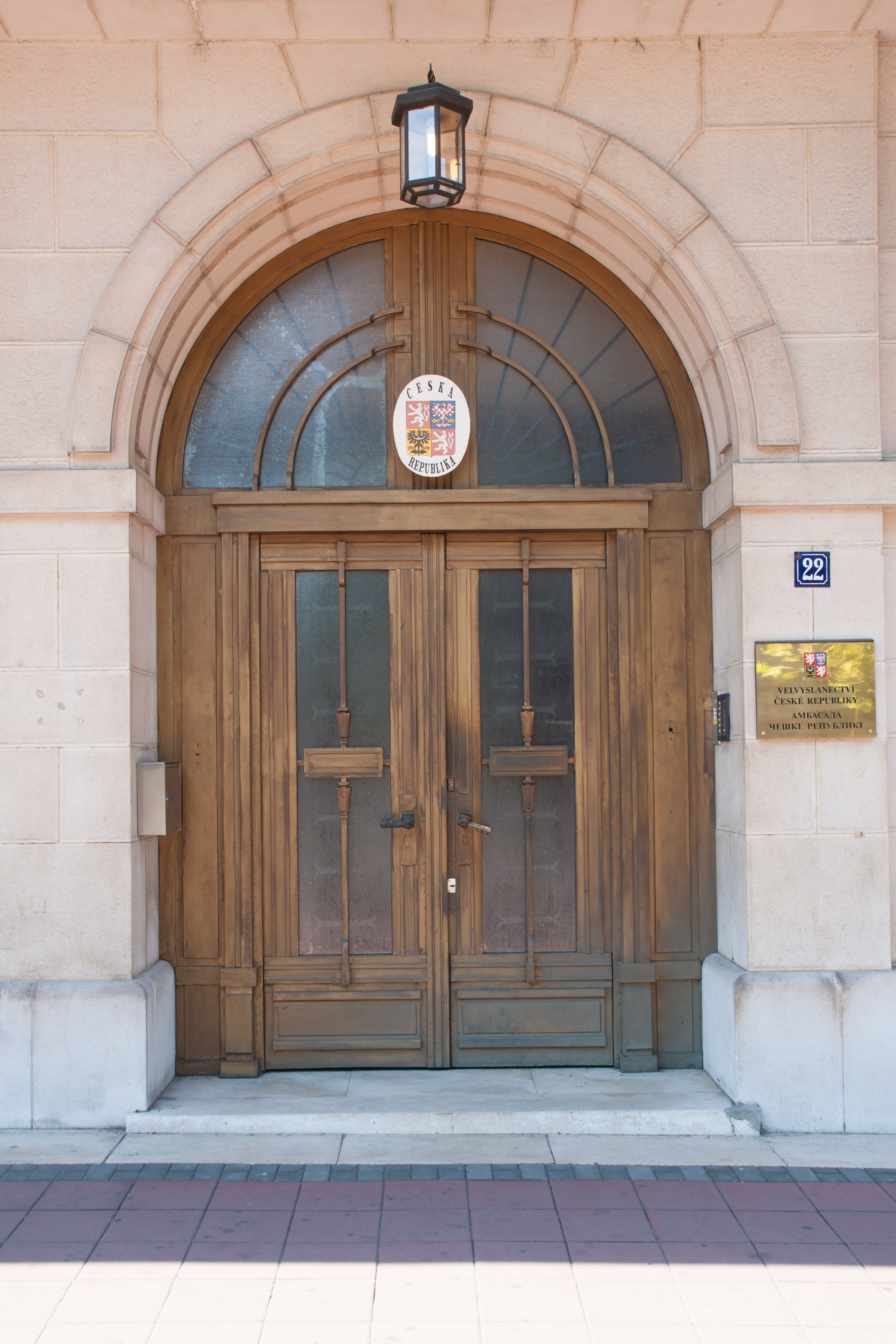 Czech Republic embassy - Belgrade